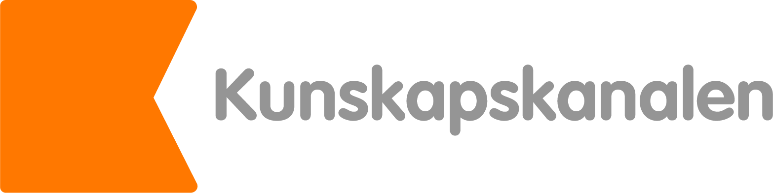 Logotyp